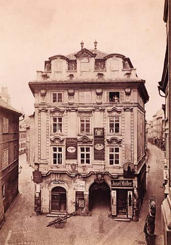 Dům U Hřebene čp. 600 tvořil klín mezi ulicem Celetnou a Štupartskou. Z komunikačních důvodů byl zbořen v r. 1883